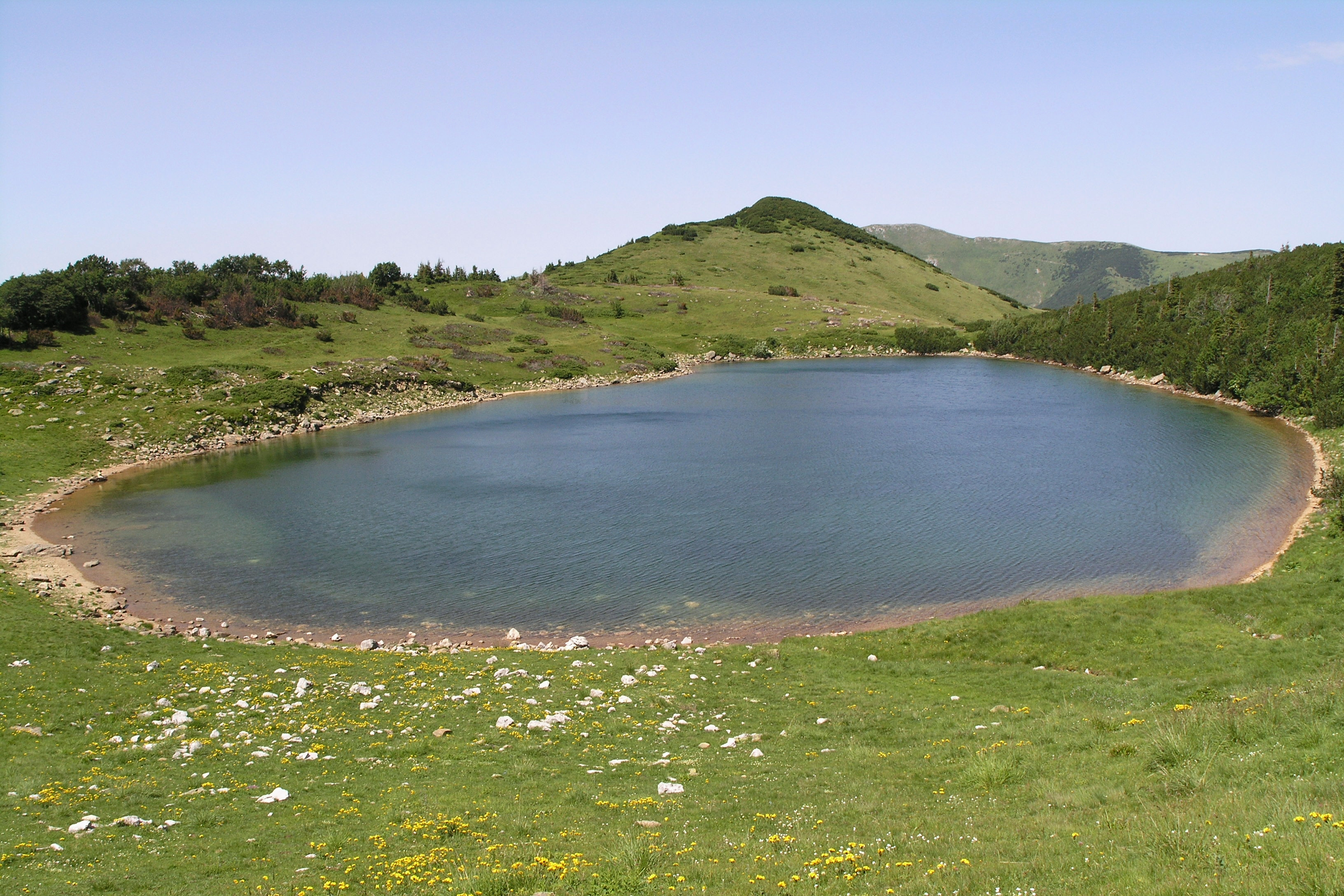 Bjelasica 2008